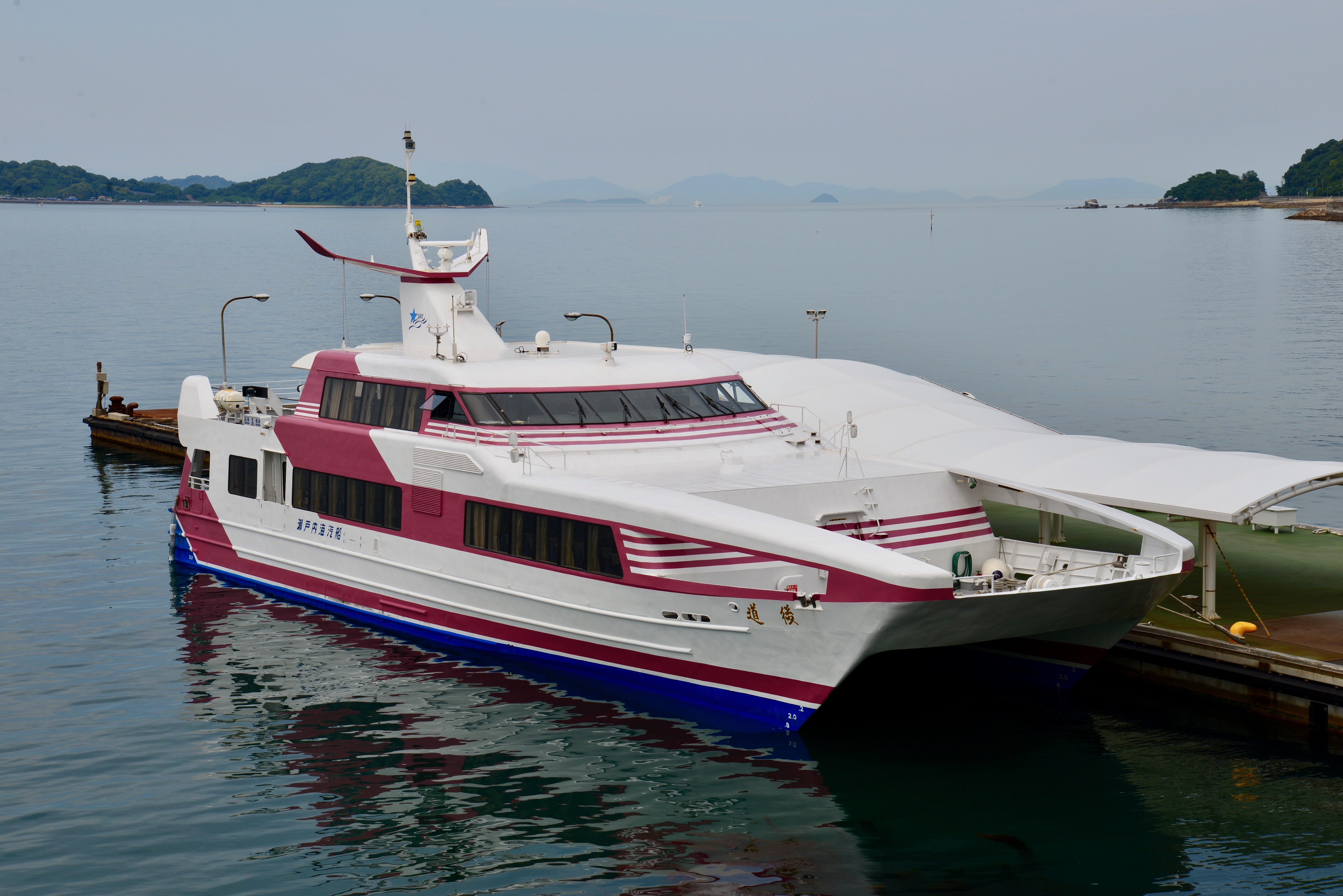 松山観光港に停泊する瀬戸内海汽船の高速船道後